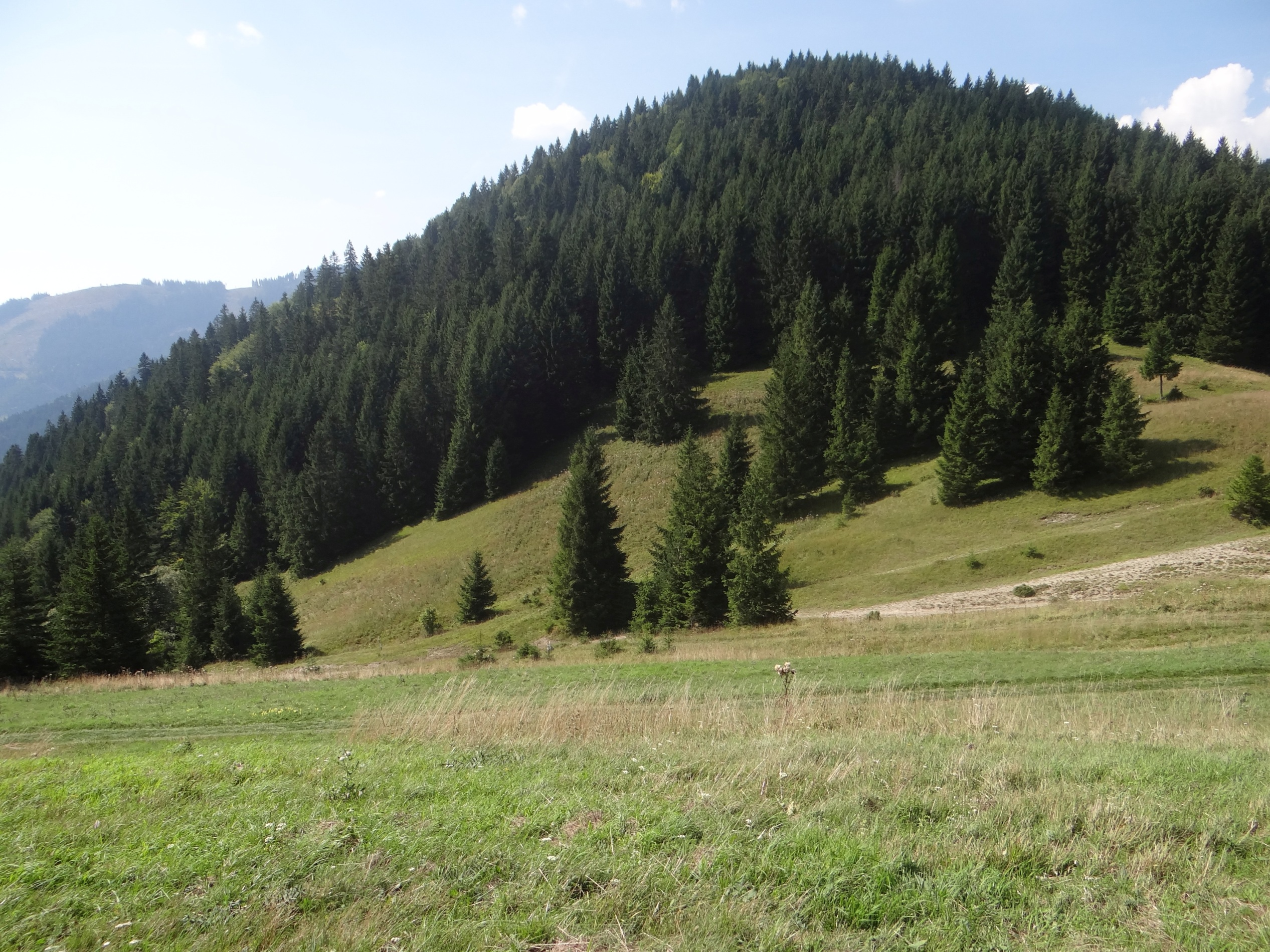 Borovnik, sedlo Pod Sidorovom